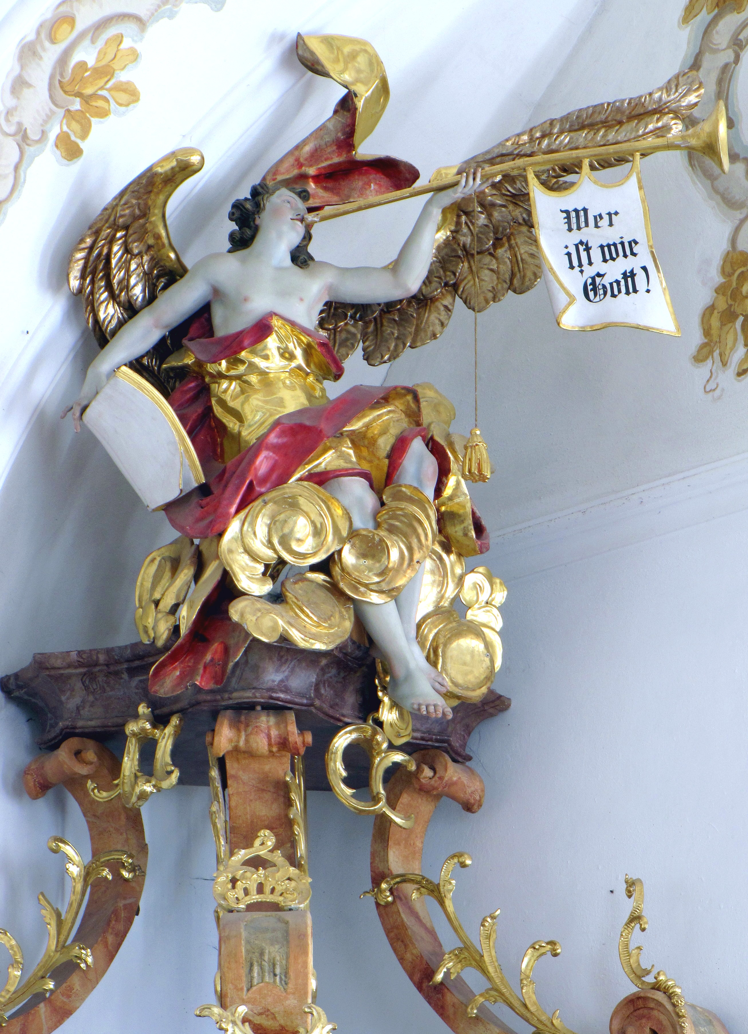 Posaunenengel von Johann Richard Eberhart, 1769, als Kanzelbekrönung der Kirche in Mittelberg